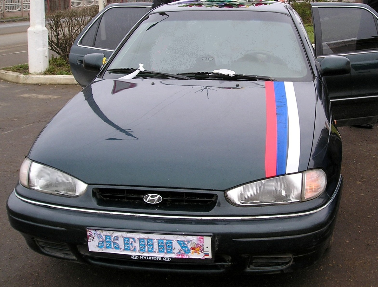 Хёнде Лантра J1 рестайлинг, вид спереди.